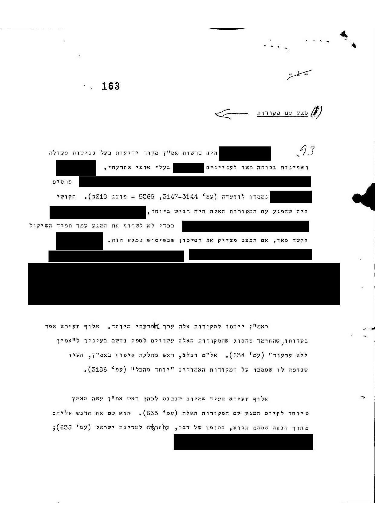 הדוח הסודי של ועדת אגרנט על האמצעים המיוחדים - עמוד 1